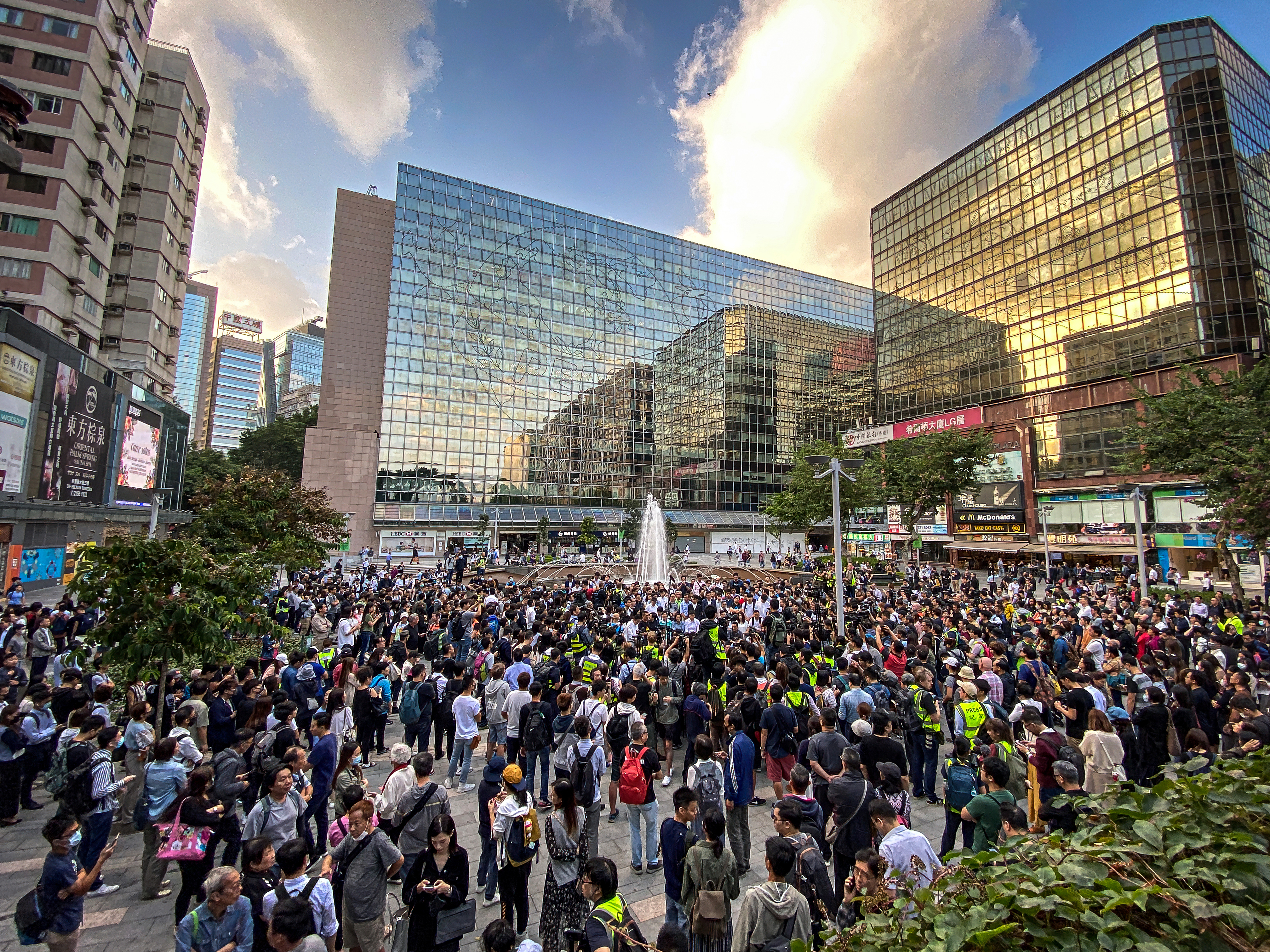 IMG_5832-sharpen-sharpen